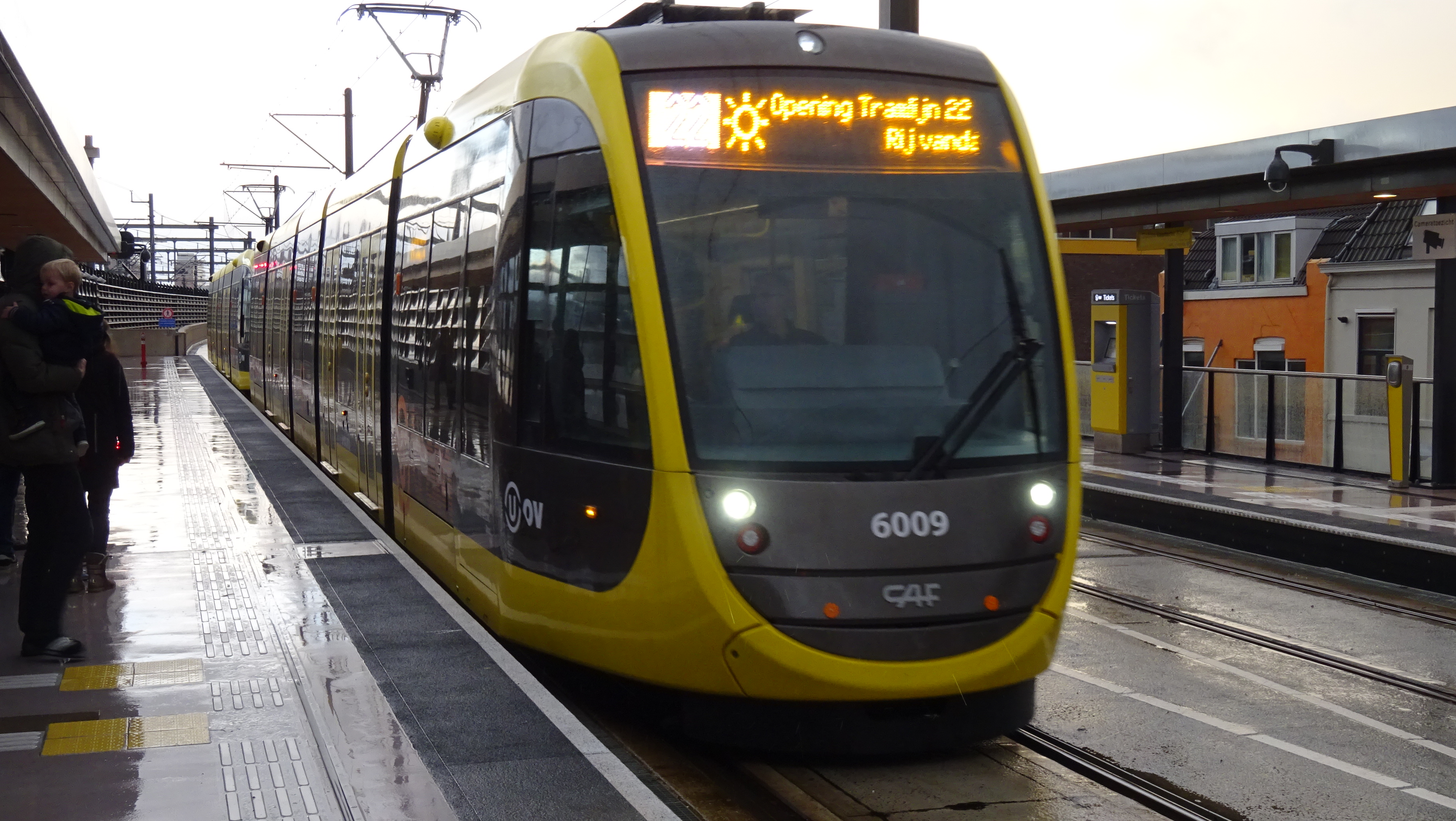 Op de openingsdag van de Uithoflijn stopt een tram komende vanaf Utrecht Centraal op de halte Vaartsche Rijn.